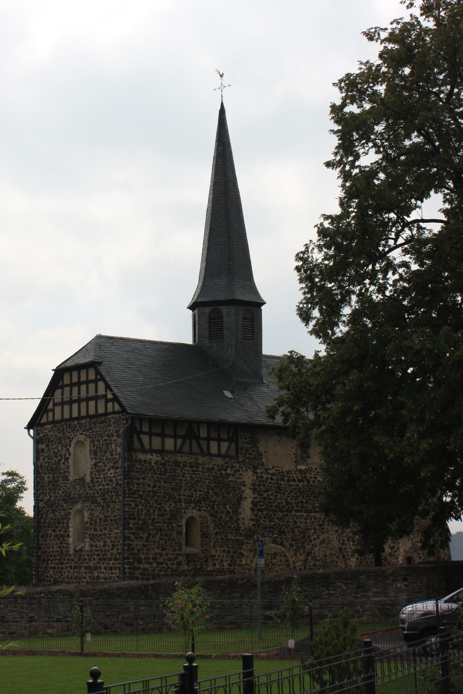 Die romanische Kapelle St. Nikolaus auf dem Friedhof von Dorchheim, Hessen von Nordosten aus gesehen. (erbaut seit dem 12. Jahrhundert)